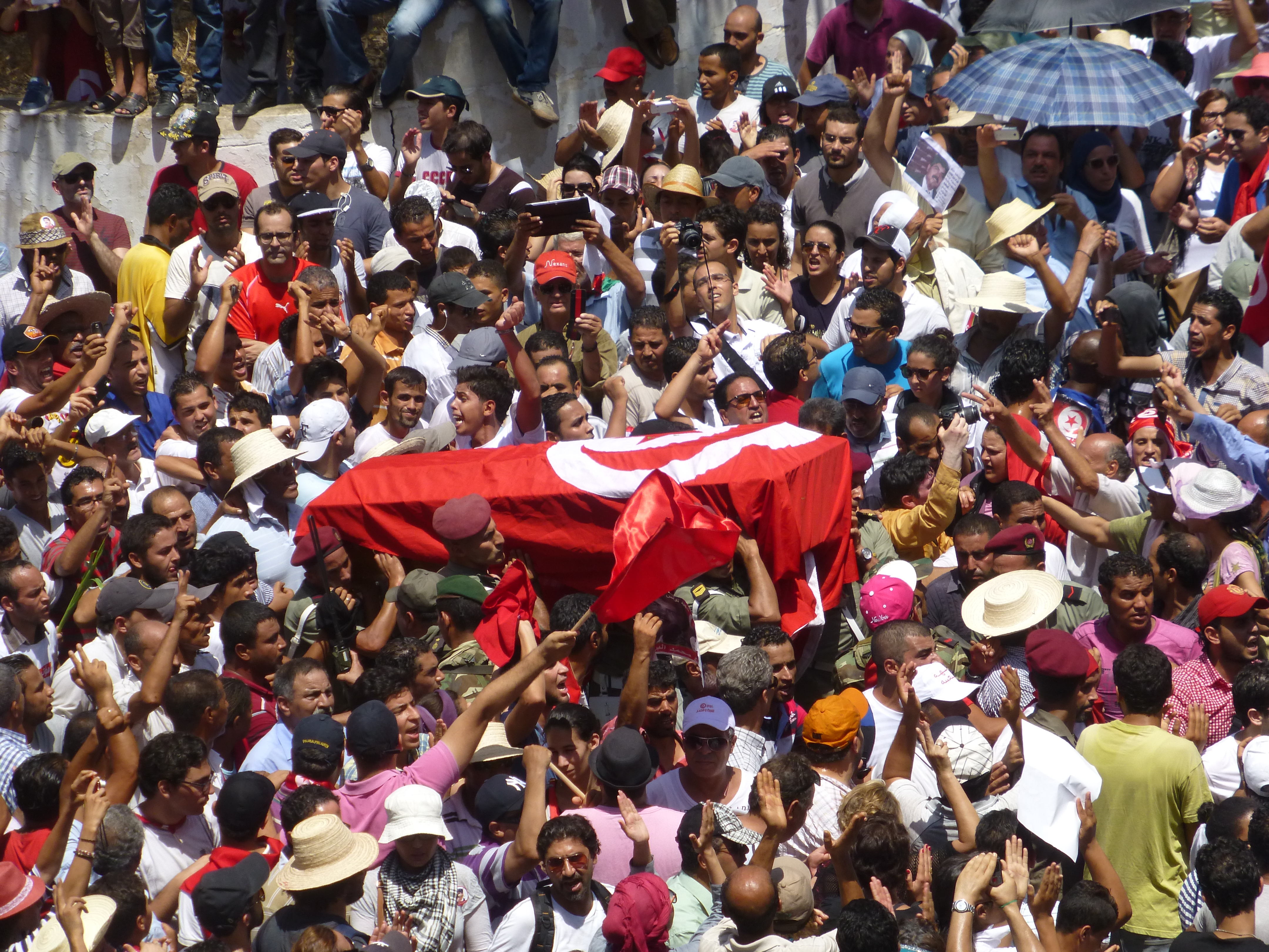 Cérémonie de l'enterrement de Mohamed Brahmi au Djellaz, Tunis